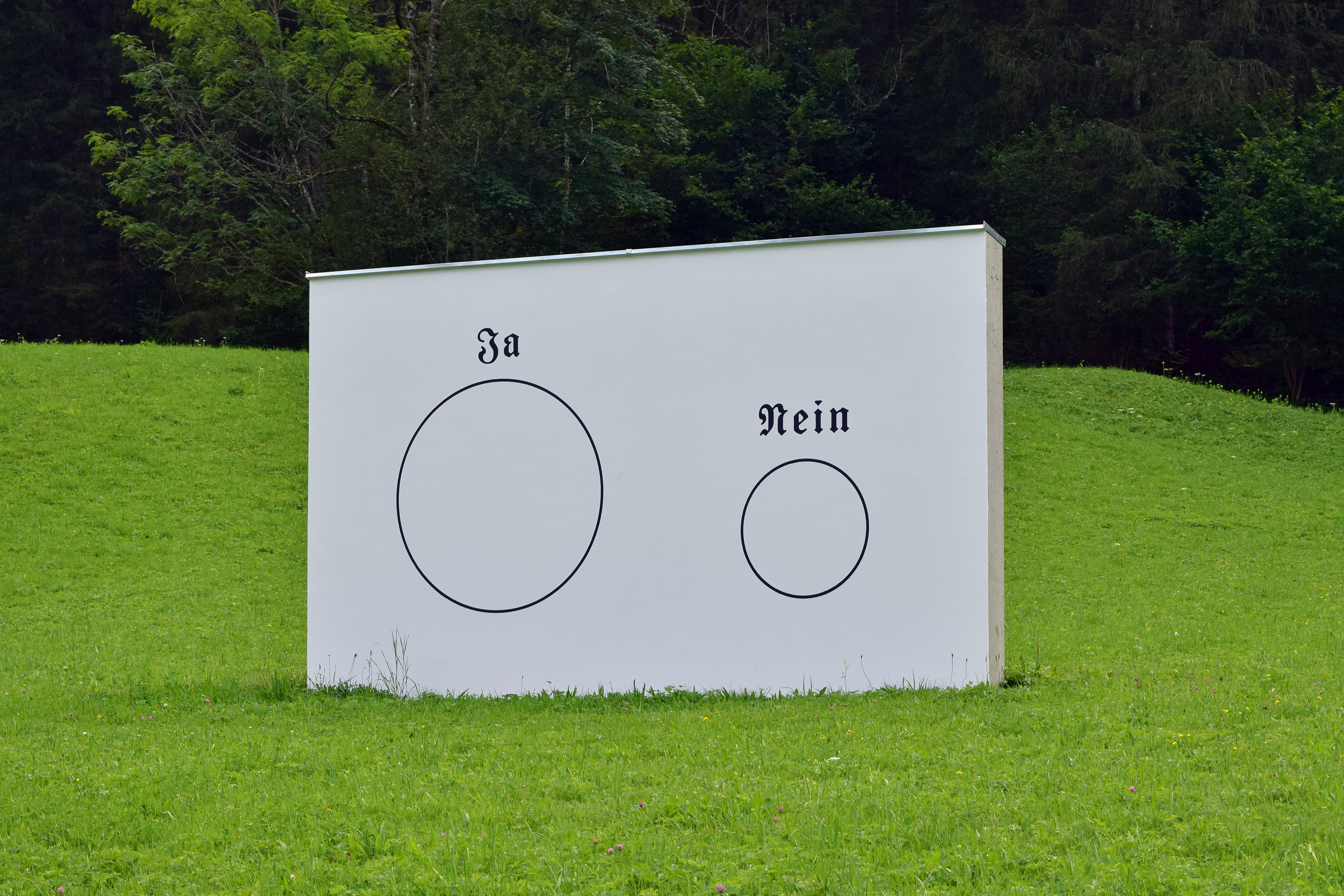 Mahnmal in Lunz am See von Florian Pumhösl (2004). Das Mahnmal befindet sich auf der Wiese gegenüber dem WasserCluster.